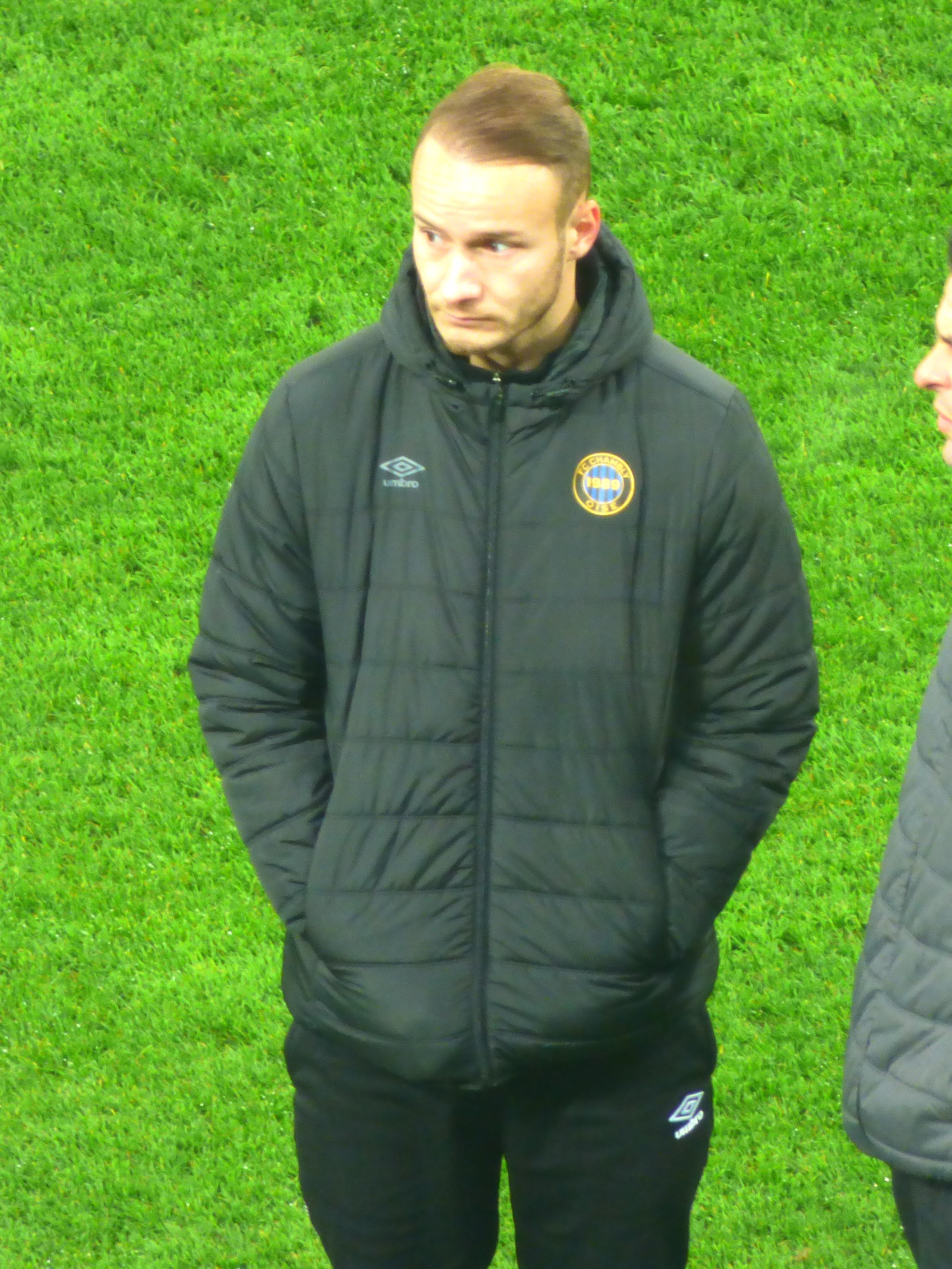 Simon Pontdemé avant le match Lens - Chambly, comptant pour la dix-septième journée du championnat de France de football de Ligue 2 2019-2020, le 3 décembre 2019.